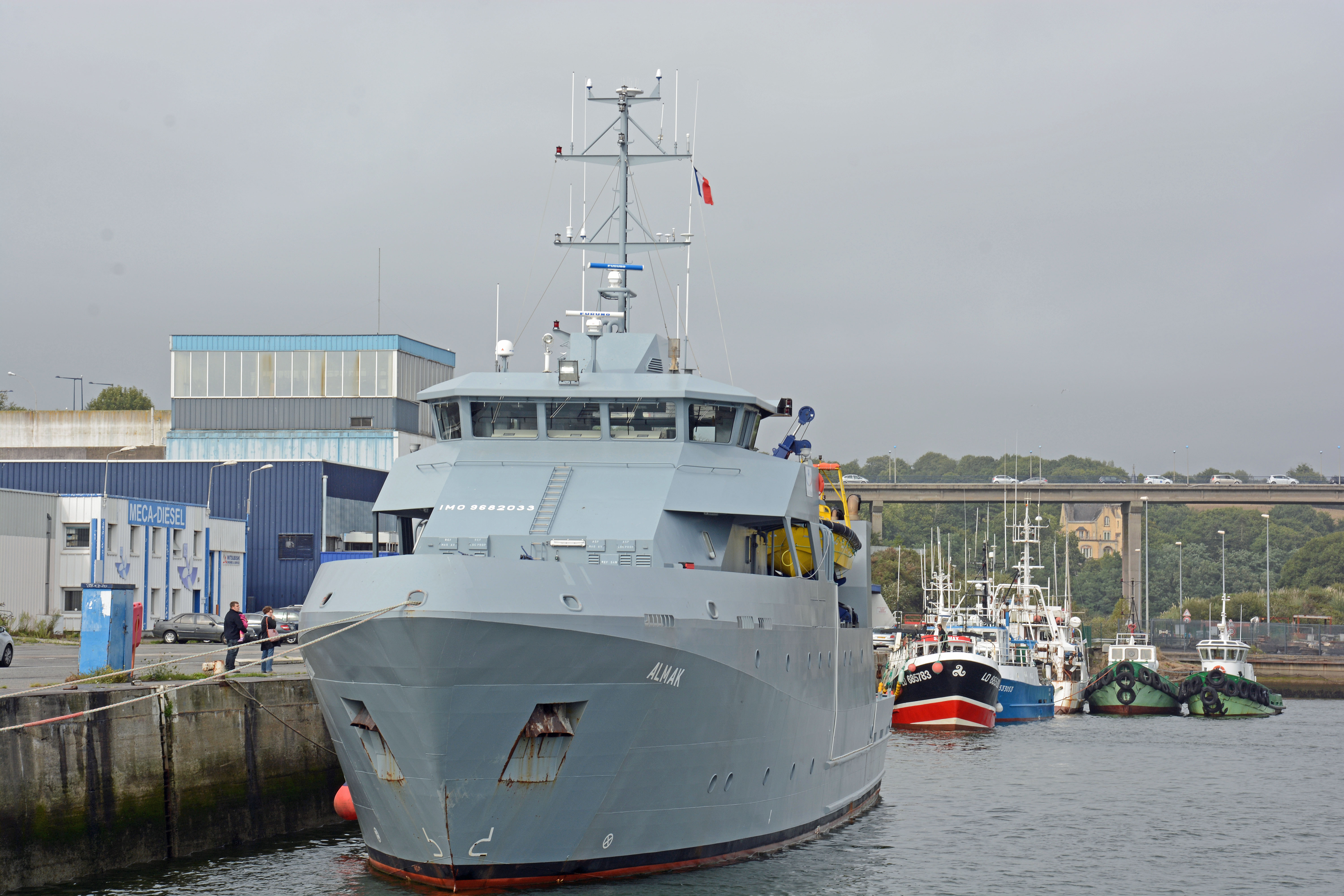 L'Almak à quai à Concarneau